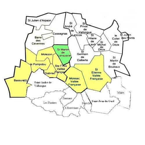 St Martin de Lansuscle dans les cantons de St Germain de Calberte, de Barres des Cévennes, de Saint Jean du Gard et de Saint-André de Valborgne. En jaune les autres communes de la communauté de communes de la Cévennes des Hauts-Gardons.